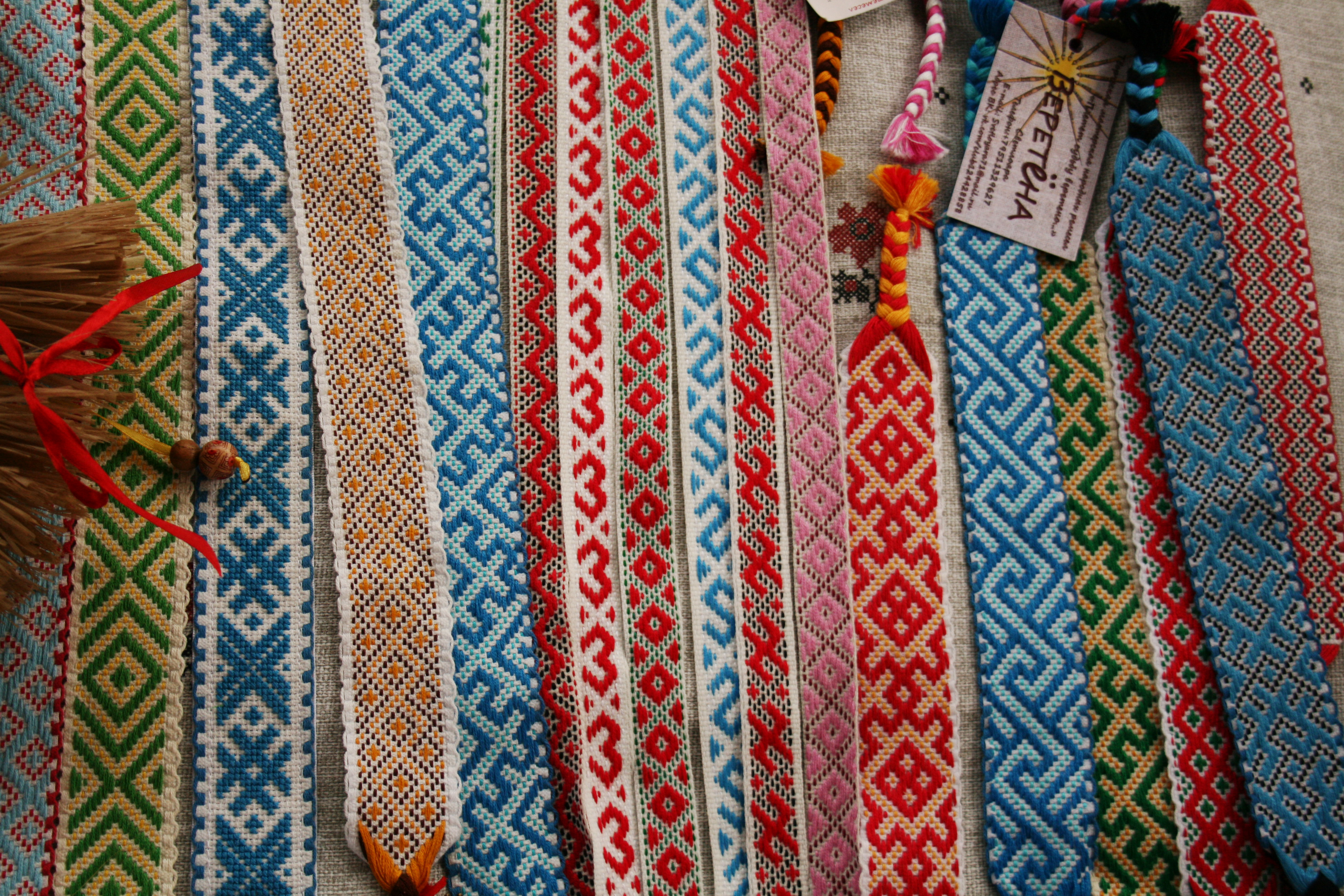 Праздник Ивана Купалы в родовом поселении «Серебряный бор», Белгородская область.